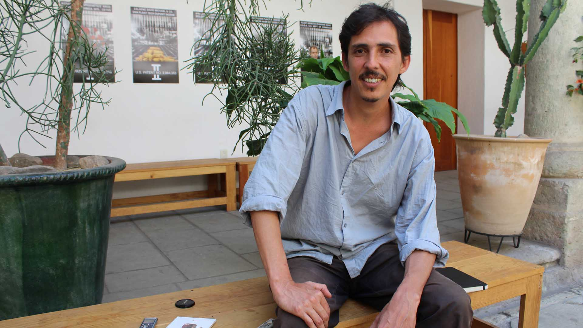 escritor